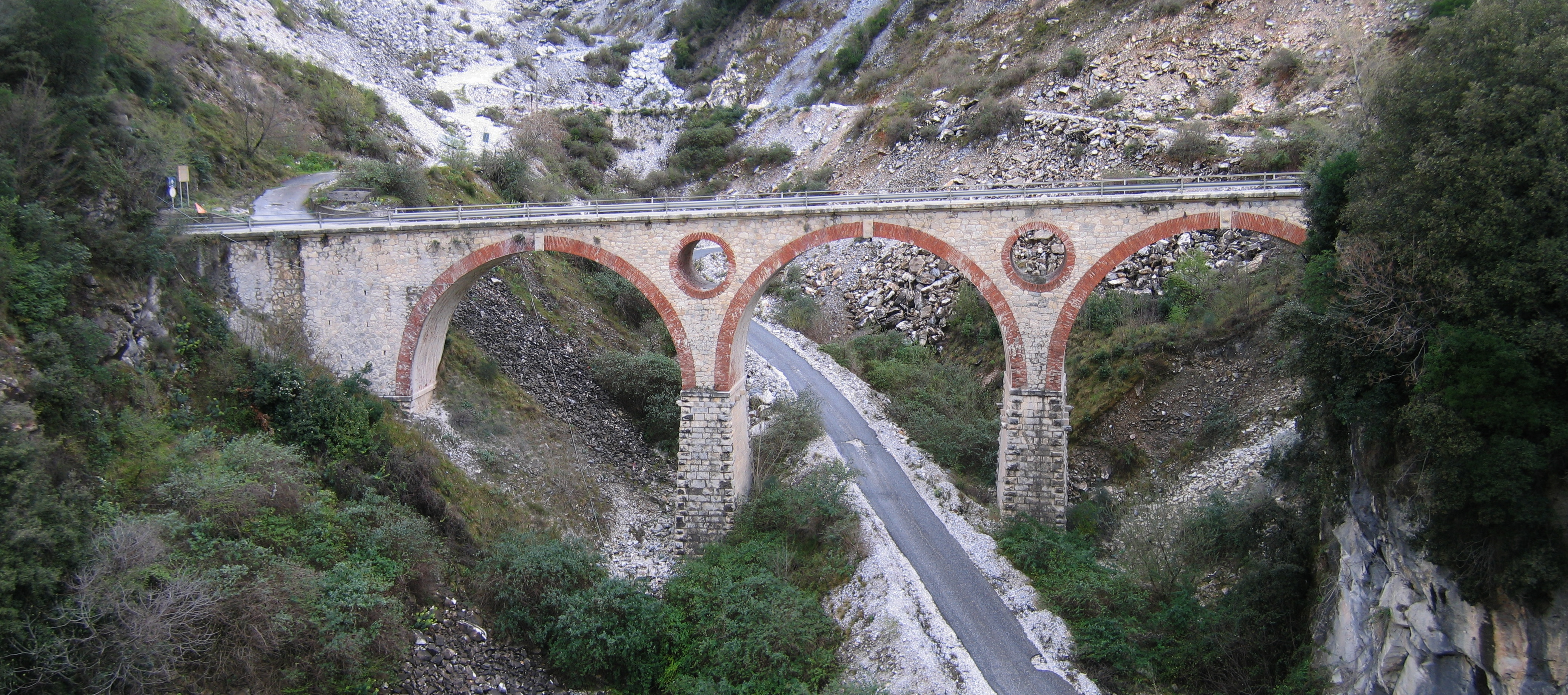 Ponti di Vara della Ferrovia Marmifera di Carrara.